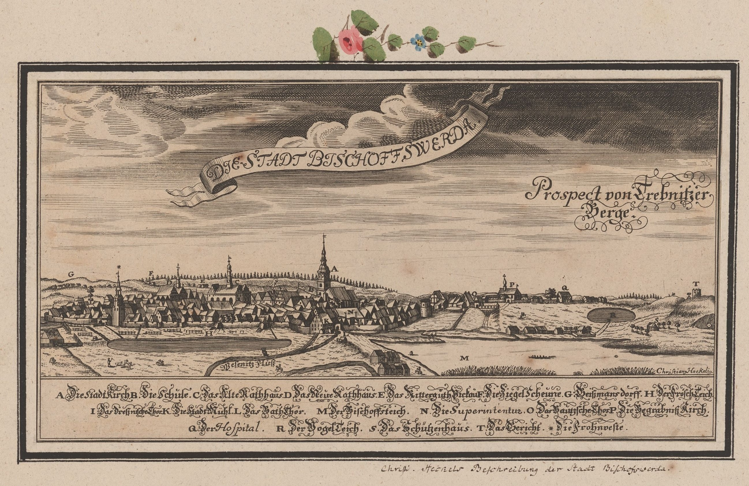 Ansicht von Bischofswerda, Kupferstich, 1713, Die Stadt Bischoffswerda : Prospect vom Trebnitzer Berge / Christian Heckelius. - [Dreßden], [1713]. - 1 Kunstbl. : Kupferstich ; 29 x 13 cm, 1713